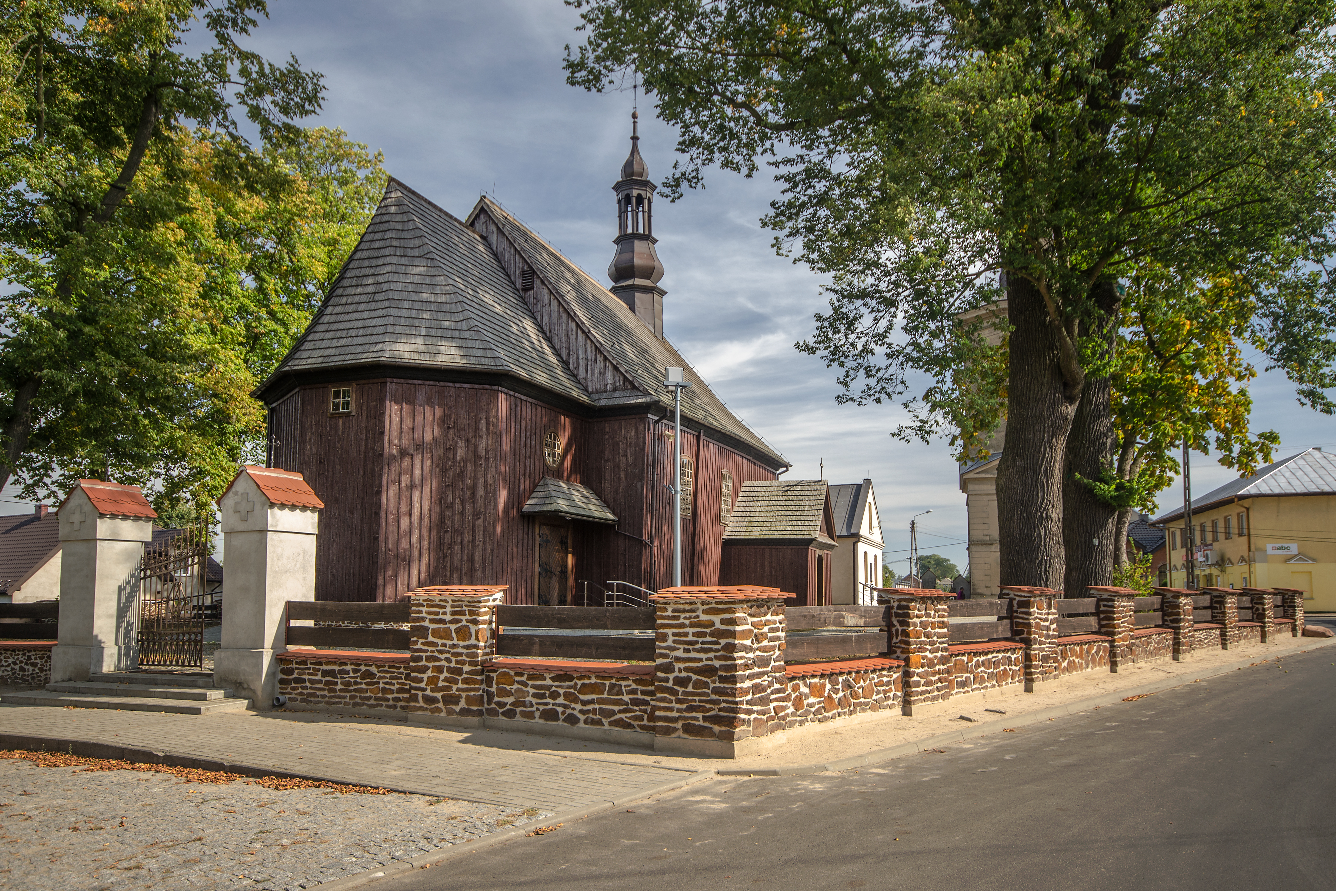 Skomlin, kościół śś. Filipa i Jakuba, 1740